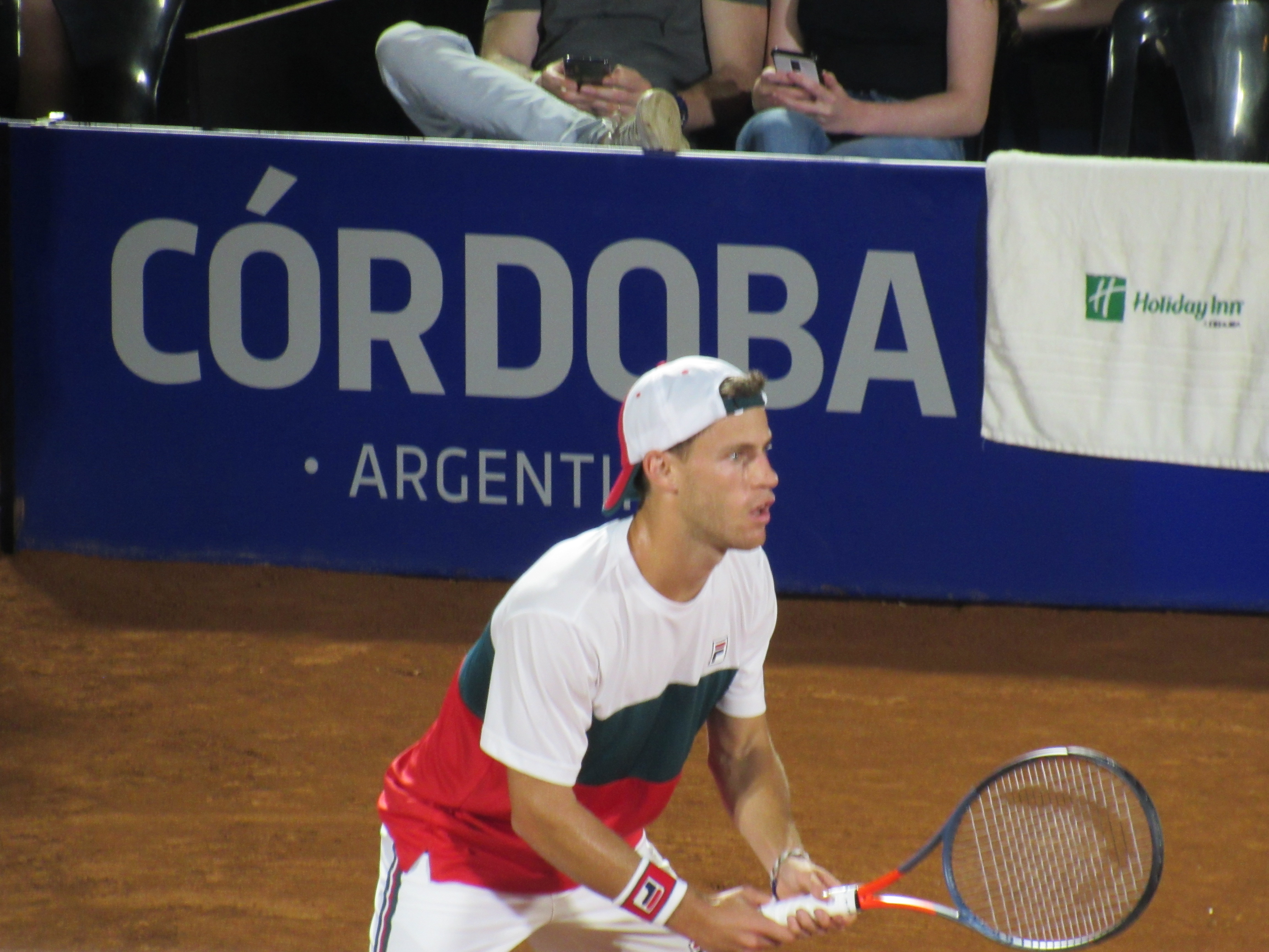 ATP 250 Córdoba Open 2020, Segunda Ronda del Cuadro Principal